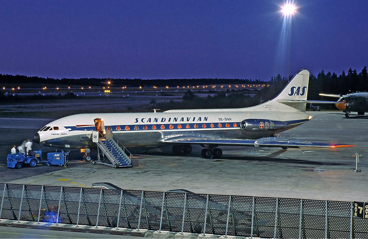 SAS Caravelle